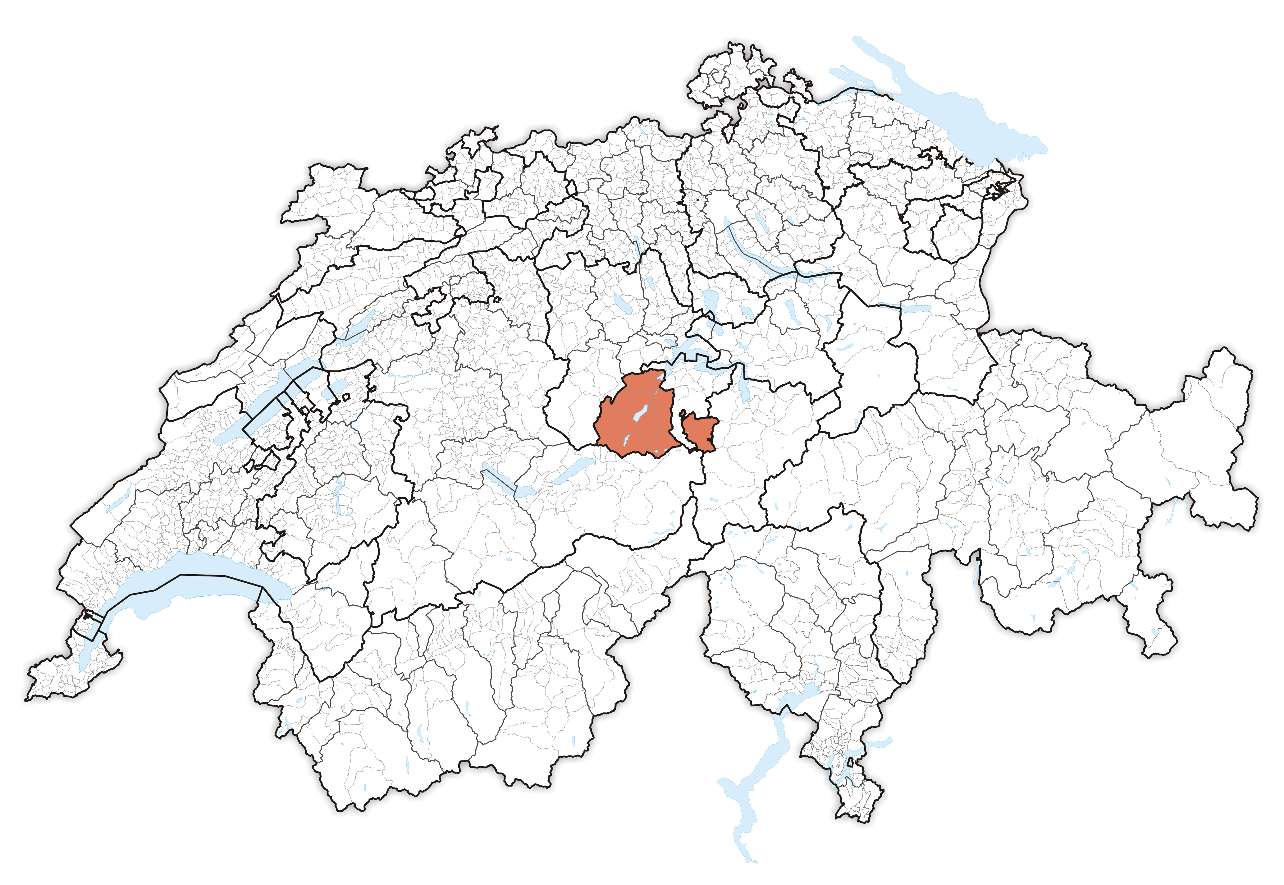 Canton Obwalden